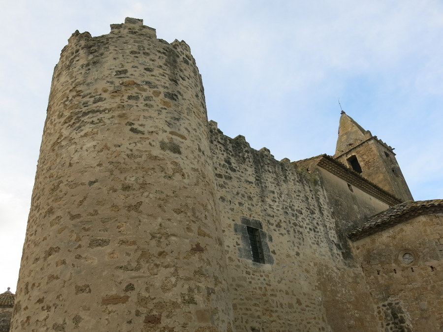 castell de Ravós, comarca del Pla de l'Estany / Catalunya